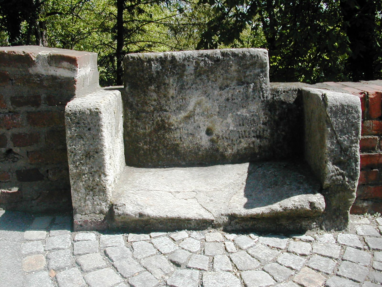 Bischofsstuhl